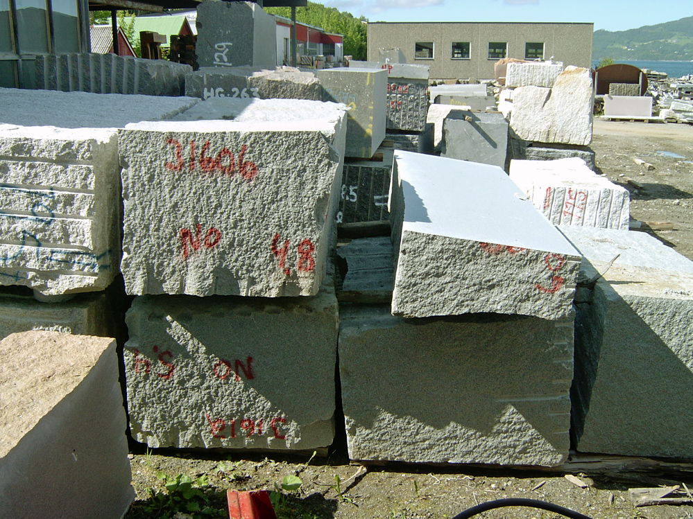 Stone industries